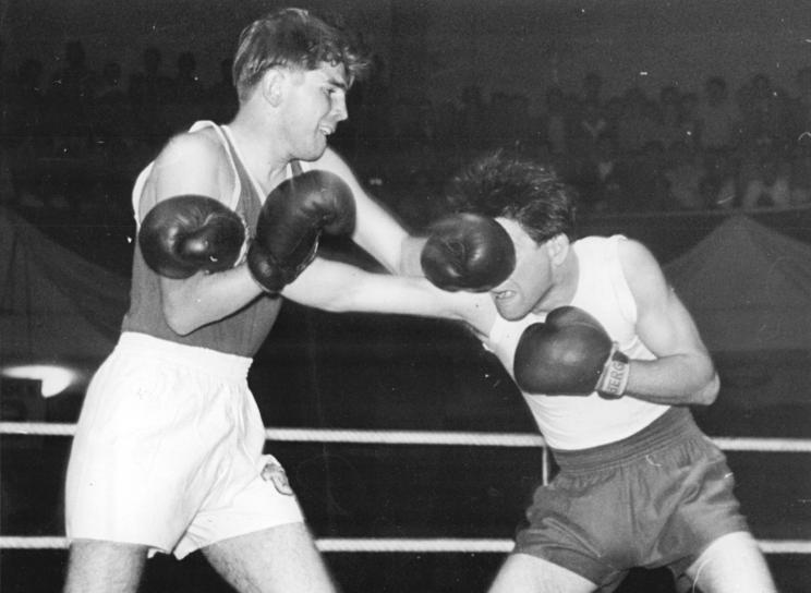 Maassen, Berg Zentralbild Berg 3.6.1954 Aktivist- Boxer kämpften in Düsseldorf. Eine Mannschaft der SG Aktivist-Espenhain Leipzig war zu Boxvergeleichskämpfen bei den Sportfreunden des Box-Ringes Düsseldorf. Mit 14:6 Punkten blieben die Sportfreunde aus Düsseldorf den DDR-Boxern überlegen. In dem Programmheft schrieben die westdeutschen Gastgeber: " Jeder echte Sportler ist erfreut, ungetrübt durch politische Unterschiede Sportkameraden zu empfangen, die die gleiche Sprache sprechen wir wir und nur durch eine künstliche Grenze von einander getrennt sind:" UBz: Kampfbild aus der Weltergewichtsklasse Maassen gegen Berg (Aktivist)